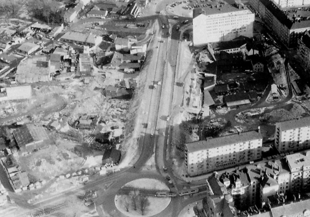 Norrtull och platsen för blivande Wenner Gren Center. Längs ner till vänster syns en rad stridsvagnshinder av typ betongpiano.